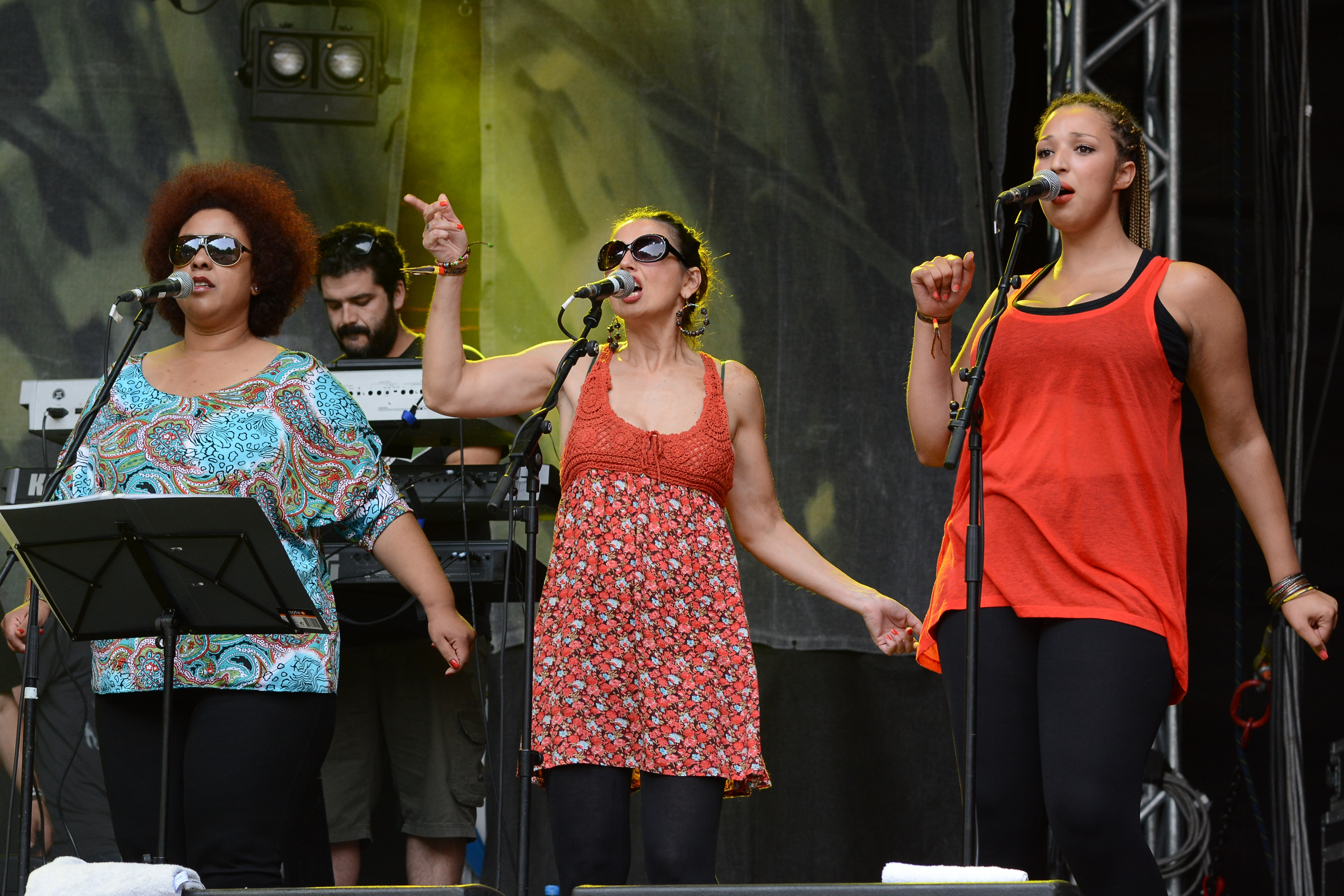 Richie Campbell / 911 Band beim Ruhr Reggae Summer in Mülheim